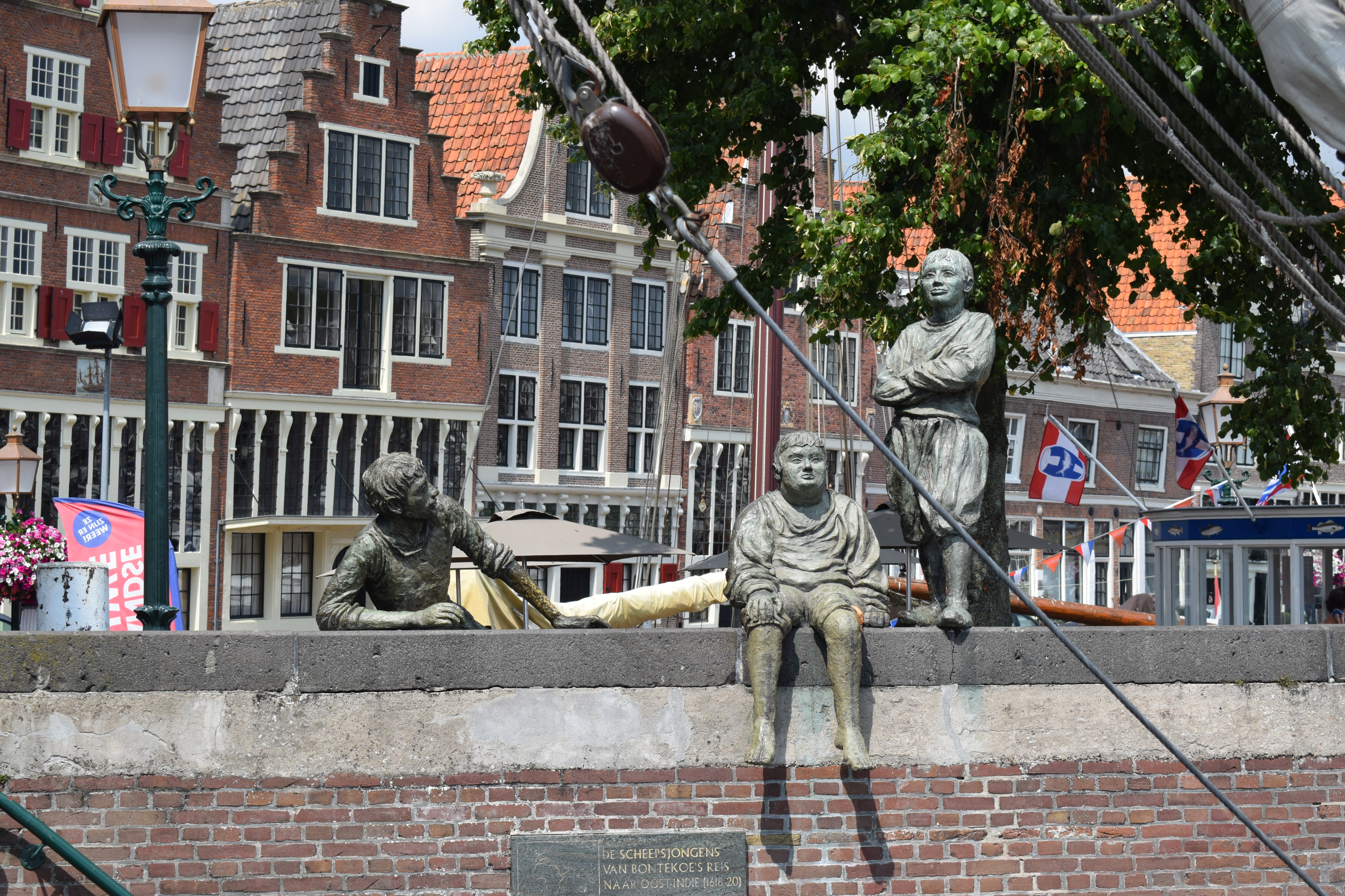 Vue de Hoorn en Frise (Pays-Bas).